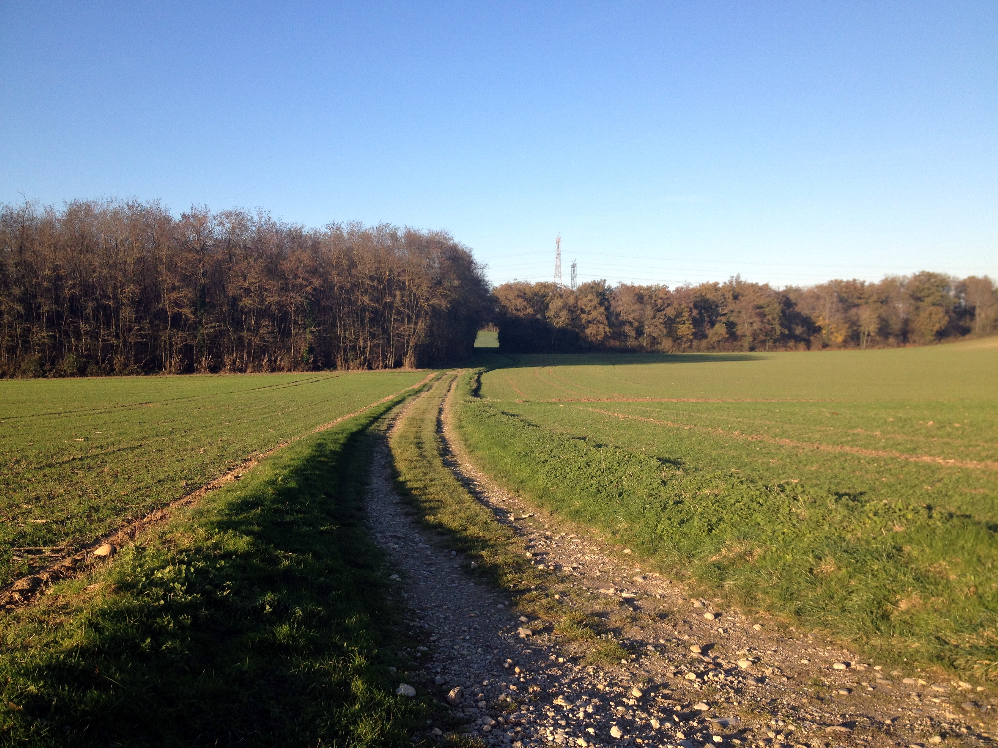 Bois de la Morte à Pizay, anciennement appelé Bois des Communes jusqu'à 1861 et l'assassinat dans ce lieu de Marie-Eulalie Bussod par Martin Dumollard.